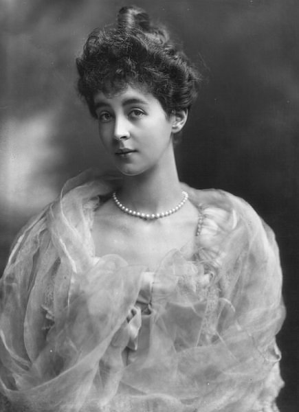 Consuelo Vanderbilt